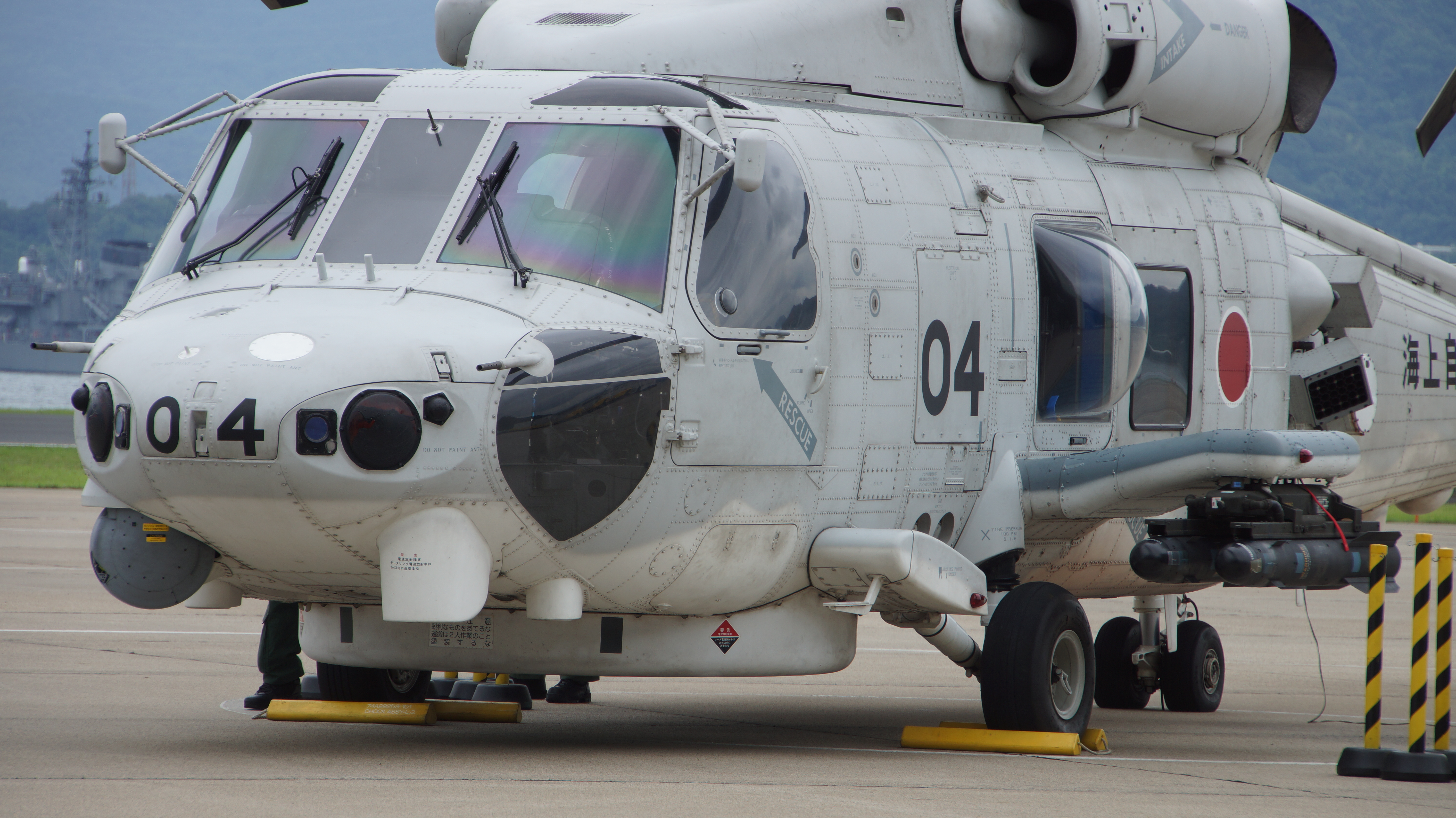 海上自衛隊 SH-60K哨戒ヘリコプター（8404号機） 胴体 左前面。2017年7月29日 舞鶴航空基地にて。